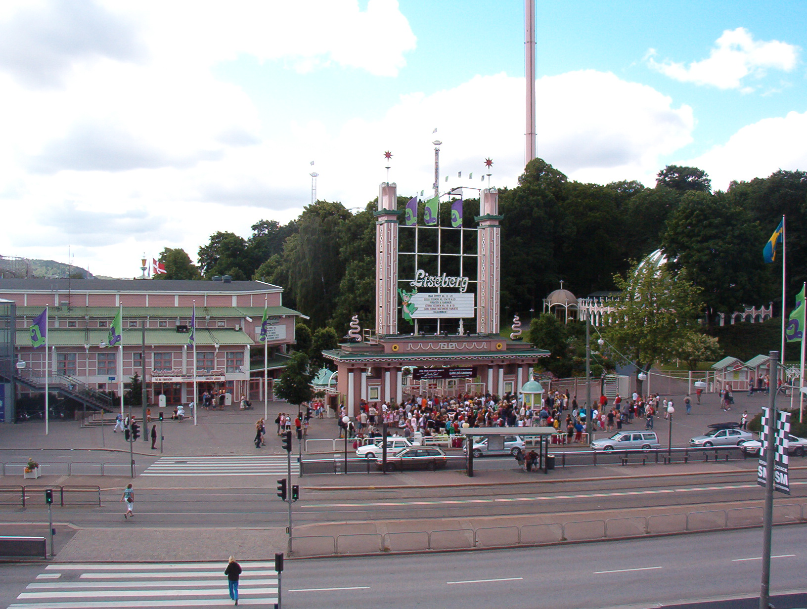 Ingång till Liseberg